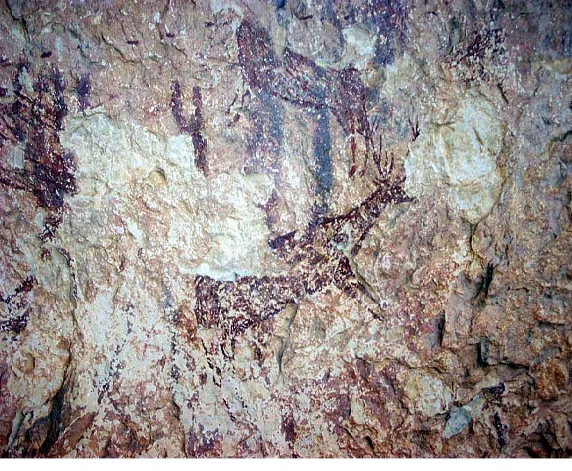 Pintures de la Sarga (Alcoi), abric II, panell 2, art llevantí: dos cérvols en una escena de caça superposats a motius esquemàtics.